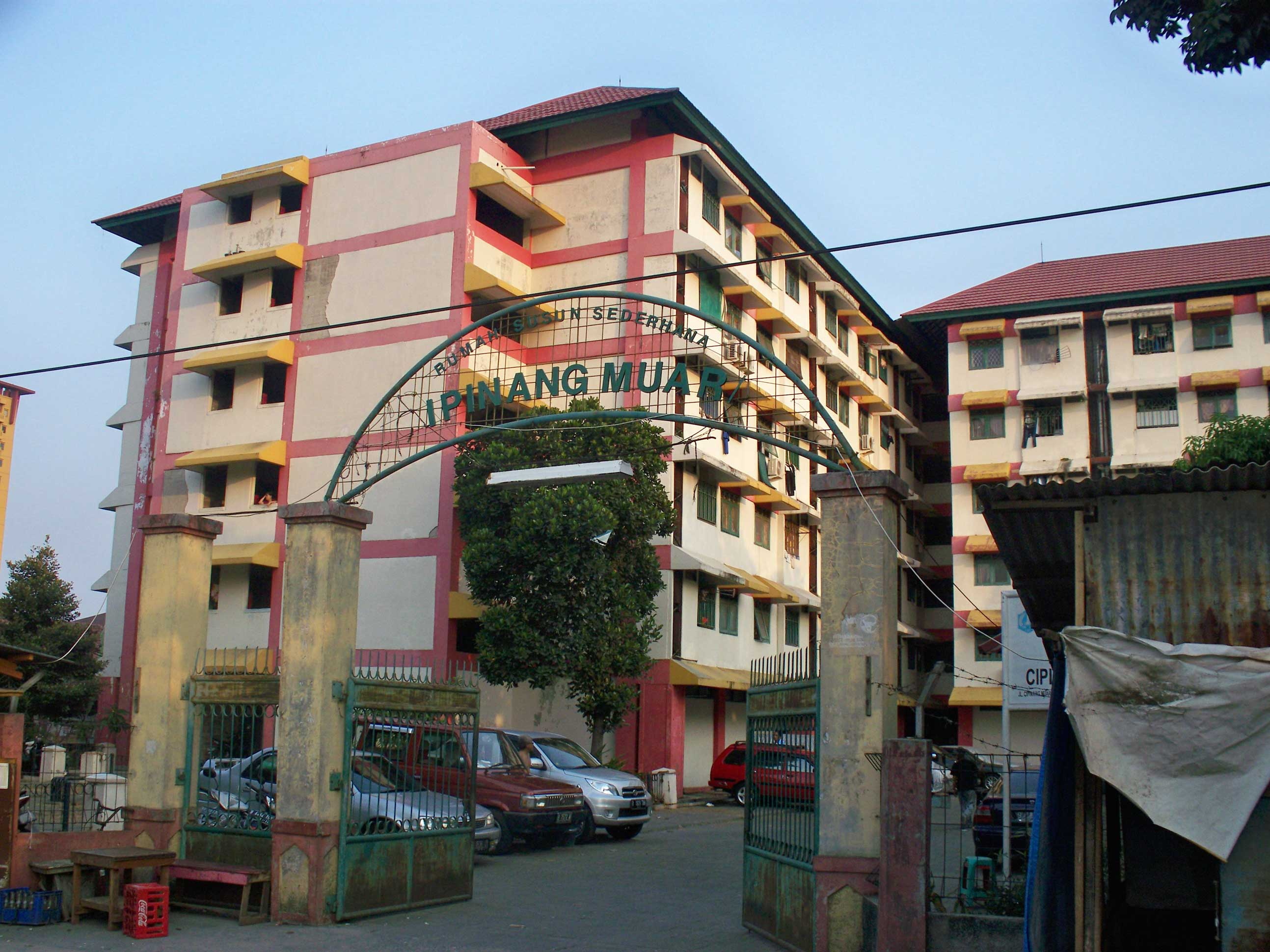 Rumah Susun Sederhana Cipinang Muara